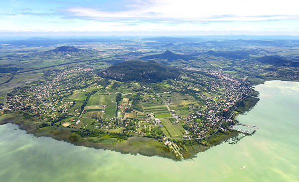 Balaton-felvidéki tanúhegyek légi fotó